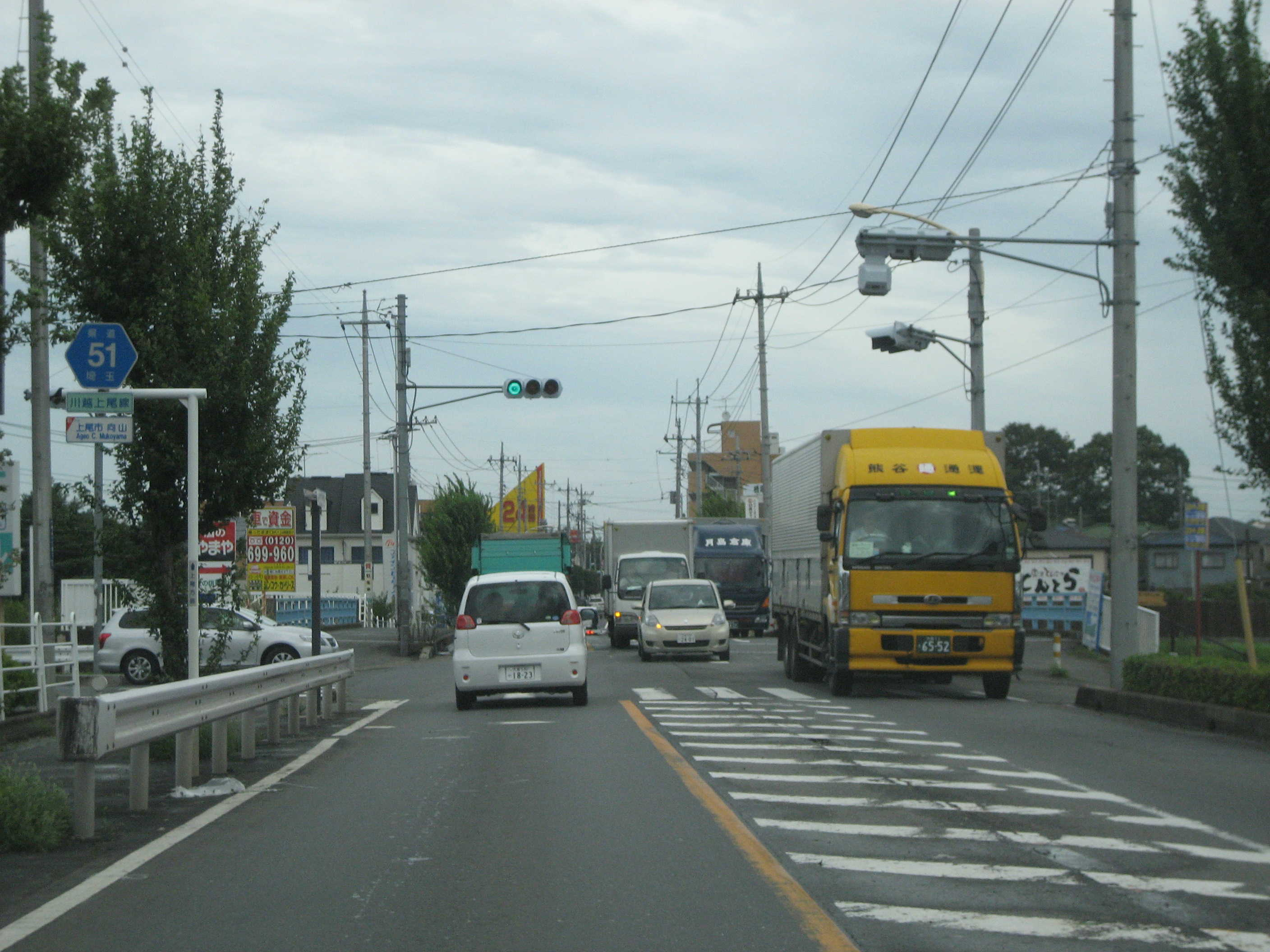 上尾市内